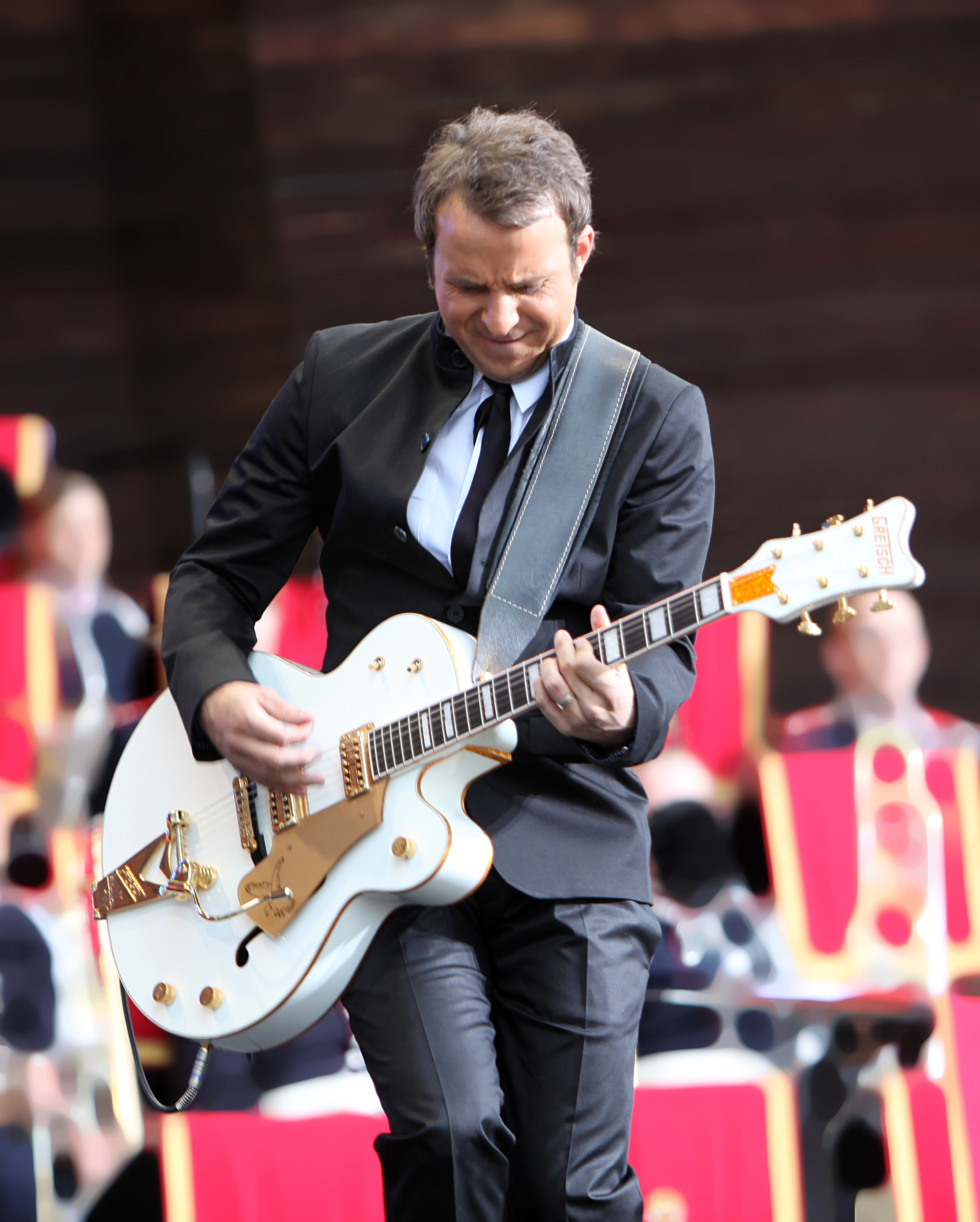 Patrik Isaksson at Swedish National Day, Skansen, Stockholm 2009